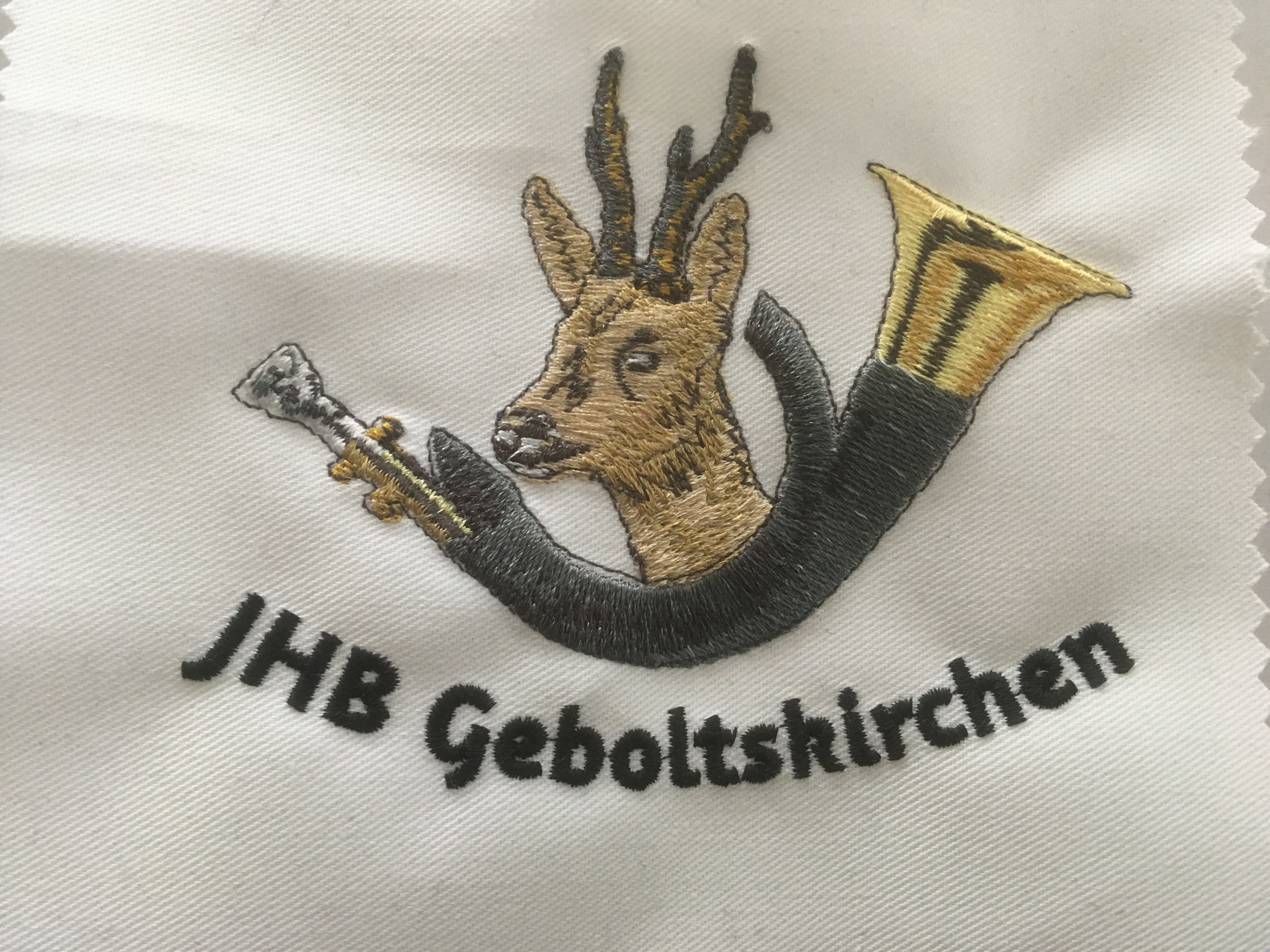 Ein Stich für die Jagdhornbläser auf ein Poloshirt. Produziet von ebets